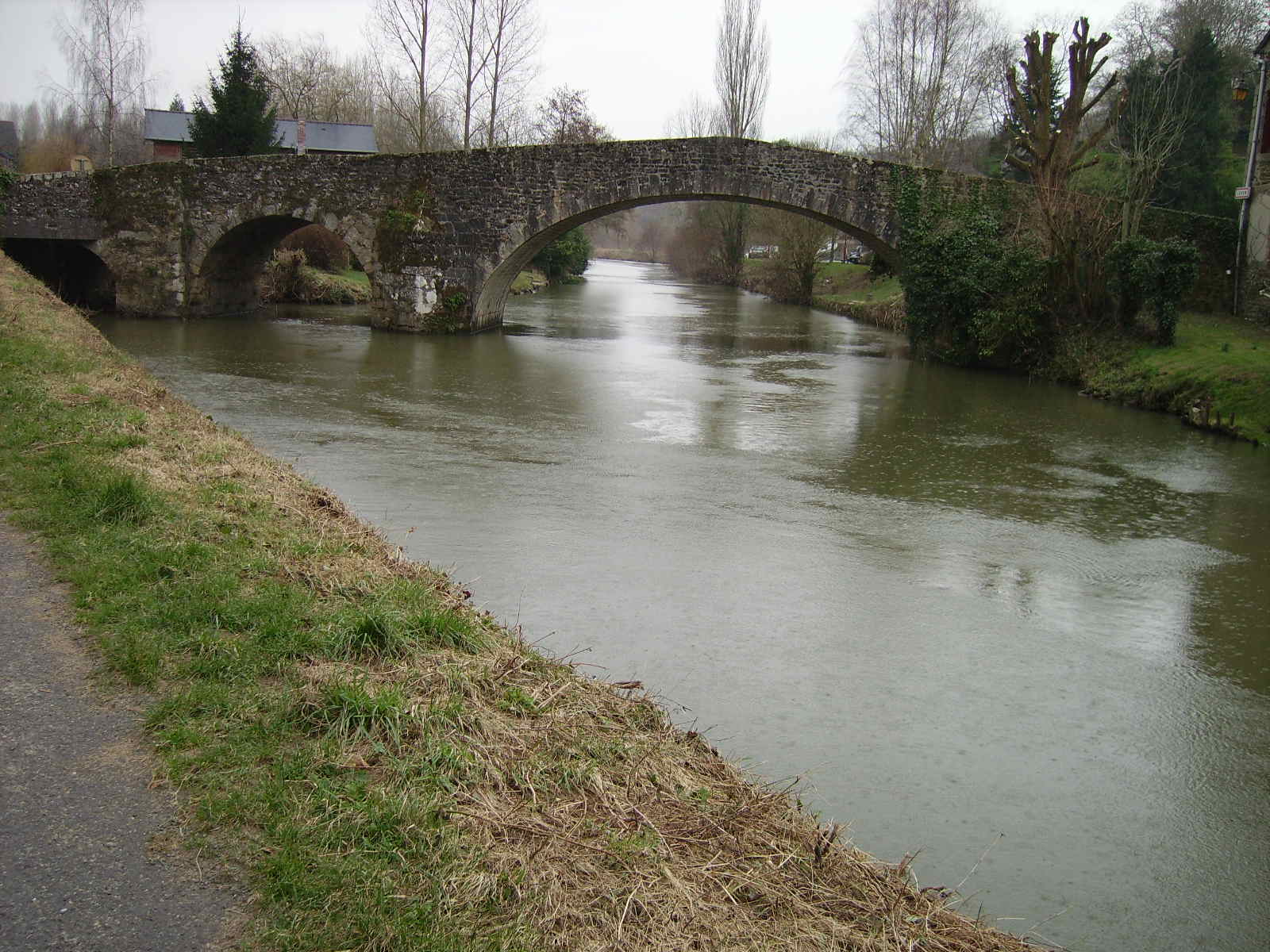 Ponto de la azenoj en Léhon